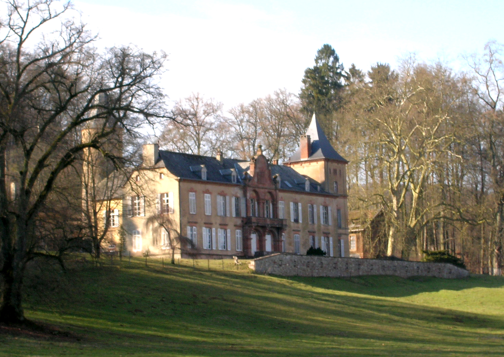 Biertrenger Schlass